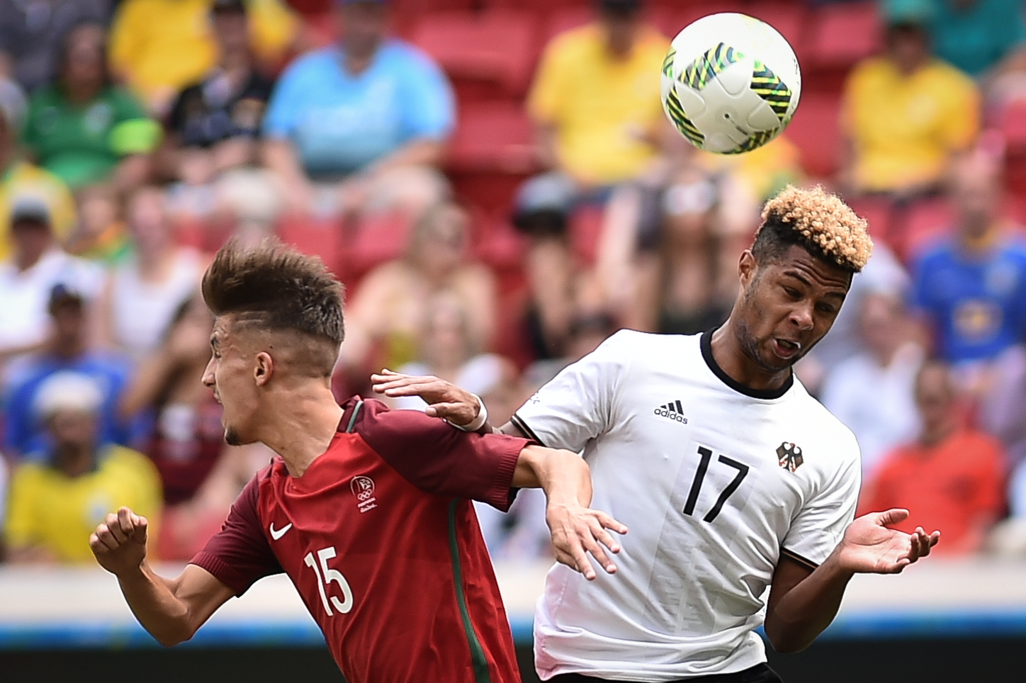 Estádio Nacional de Brasília Mané Garrincha, Brasília, DF, Brasil, 13/8/2016 Foto: Andre Borges/Agência Brasília Portigal e Alemanha jogam neste sábado (12), no Estádio Mané Garrincha, pelas quartas de final do futebol masculino nas Olimpíadas 2016.